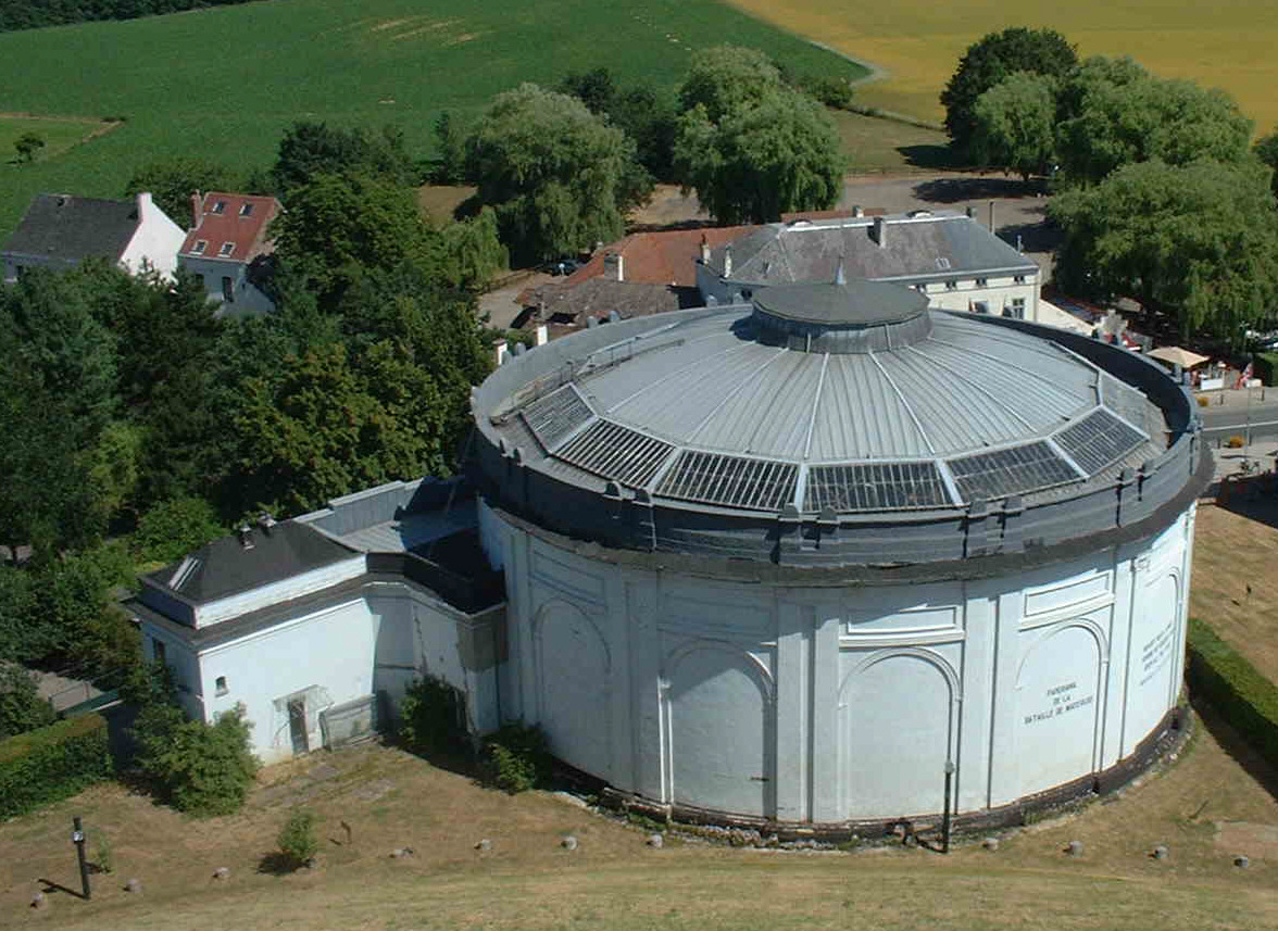 Salle du panorama de la bataille de Waterloo.